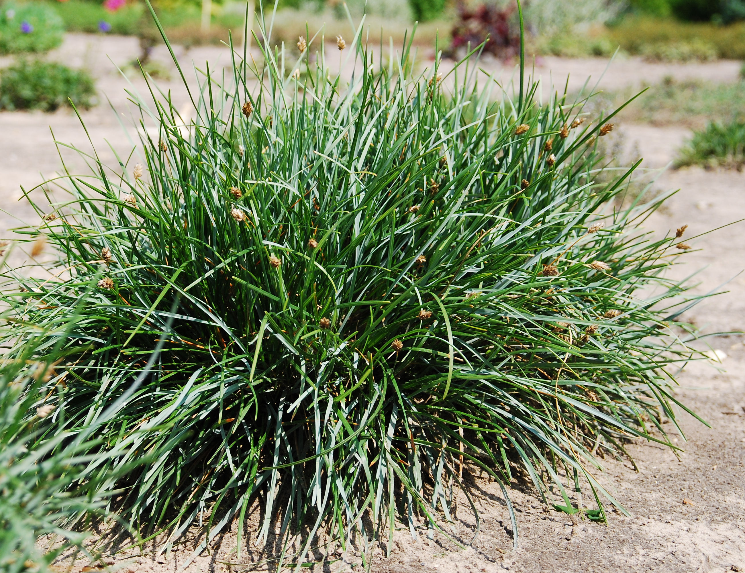 Sesleria sadlerana